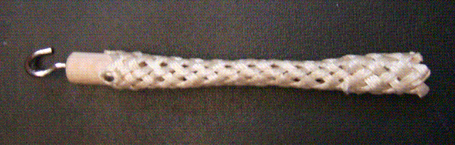 Darstellung eines Mädchenfängers